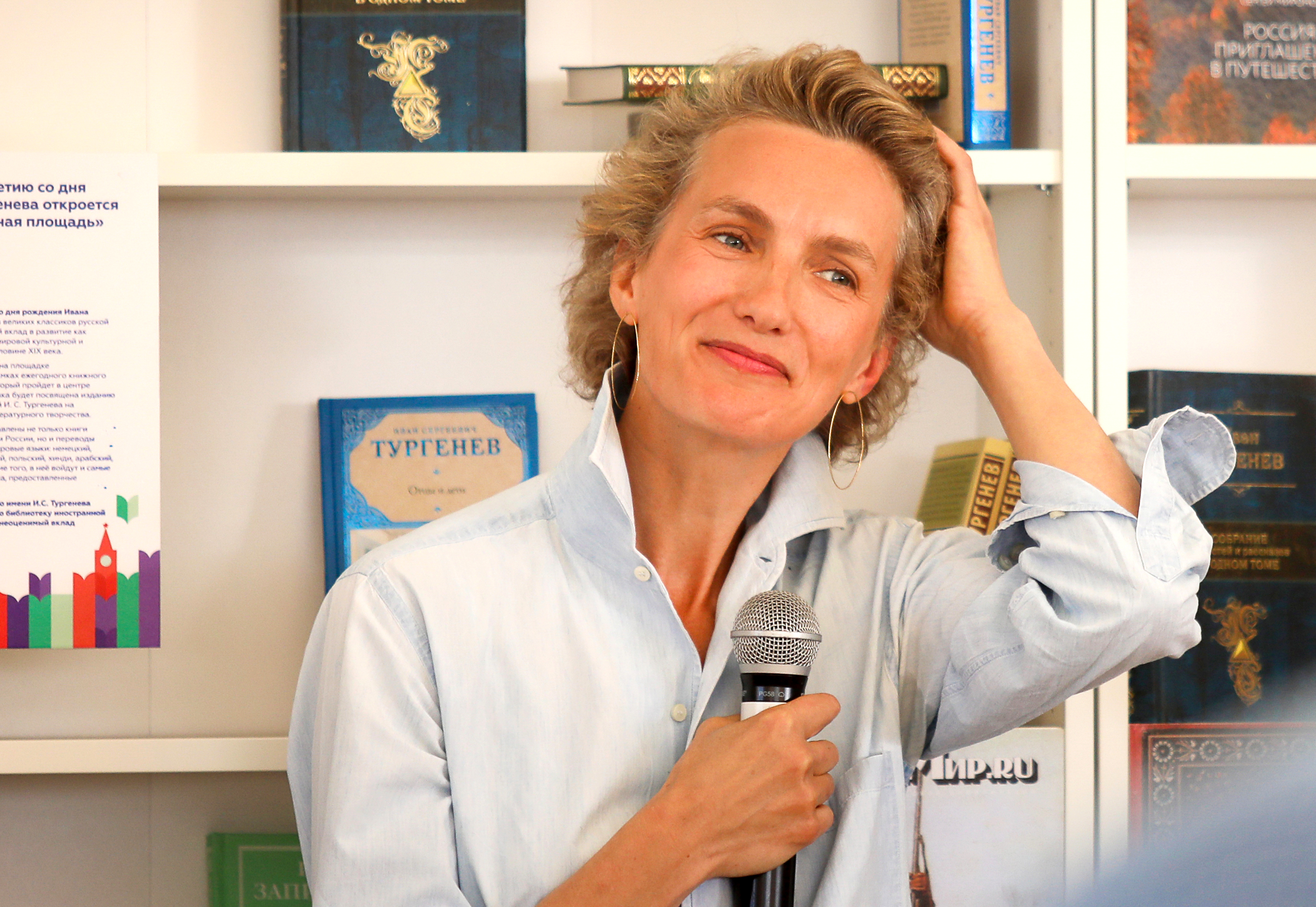 Французская писательница Анна Гавальда на книжном фестивале "Красная площадь" в Москве.